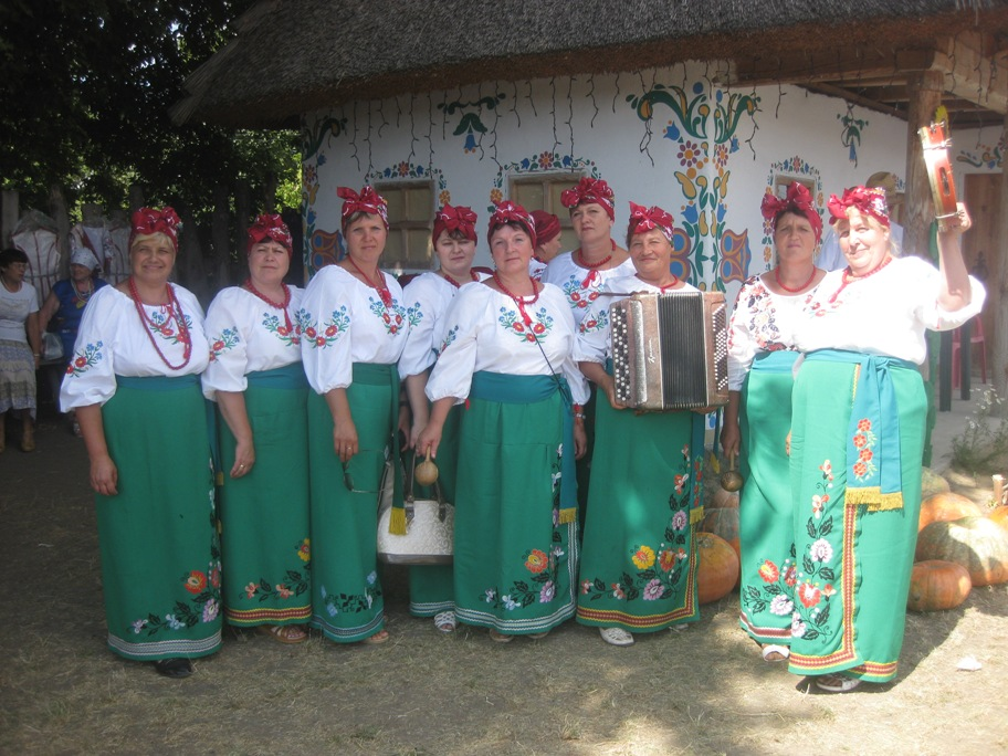 Ансамбль Чарівниця